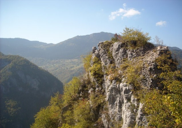 Остаци куле Старог града на саставцима Паљанске и Мокрањске Миљацке.